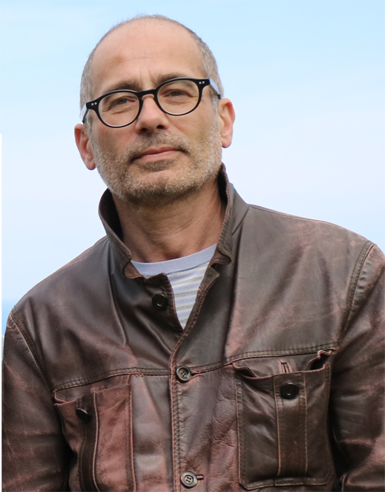 Massimo Sansavini marzo 2017